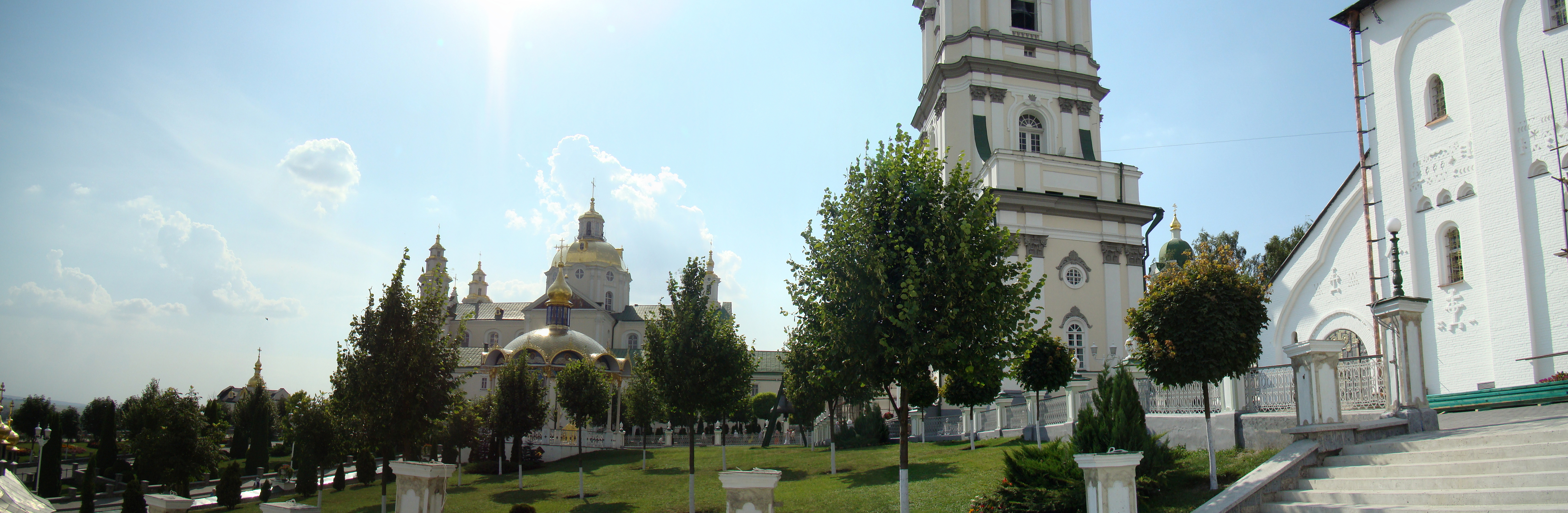 Почаївська лавра :, Почаїв, пл. Возз"єднання